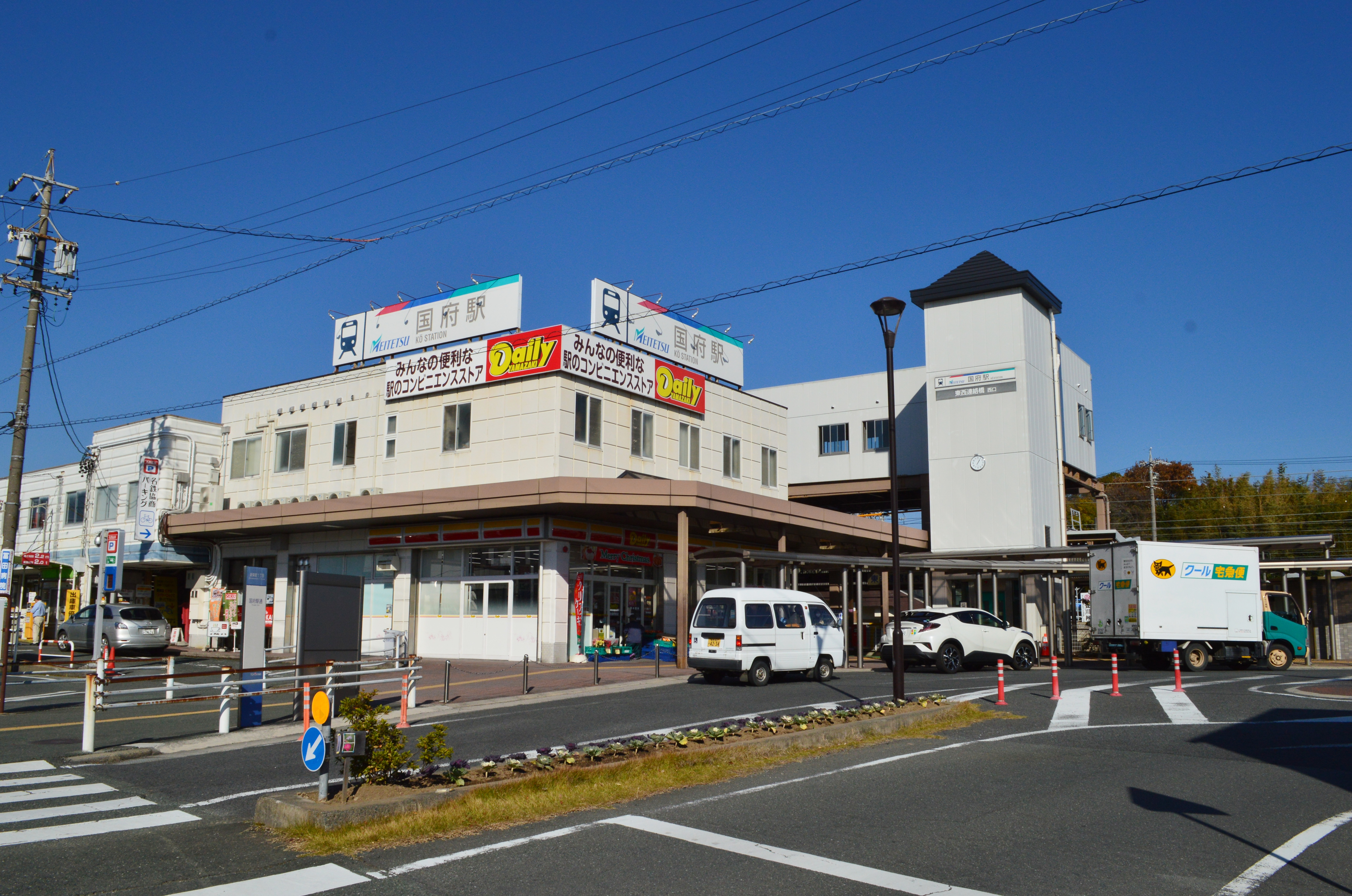 国府駅 (愛知県) 駅舎